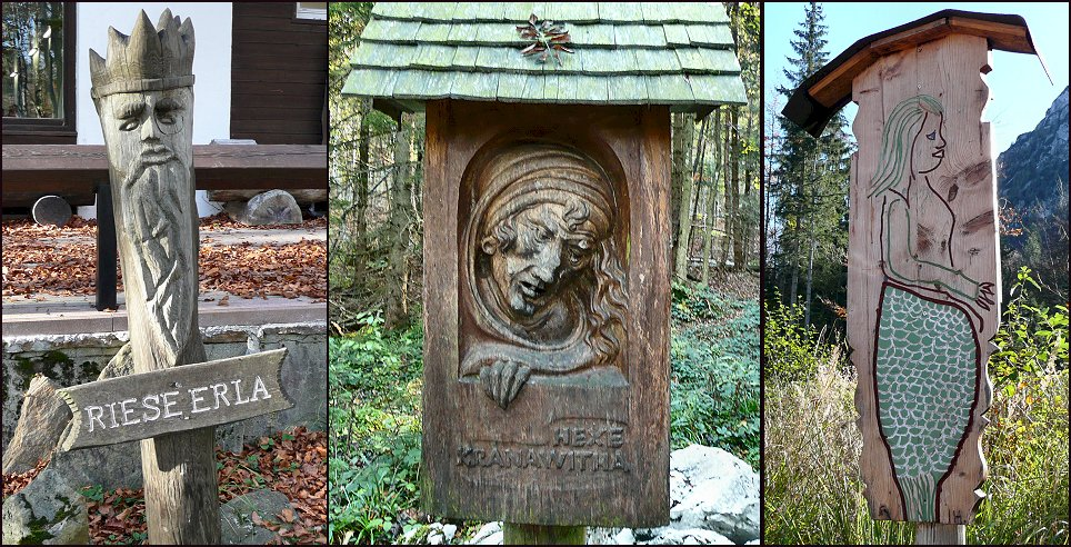 Darstellungen des Riesen Erla, der Hexe Kranawitha und der Nixe Blondchen (Waldlehrpfad am Grünberg, Gmunden)